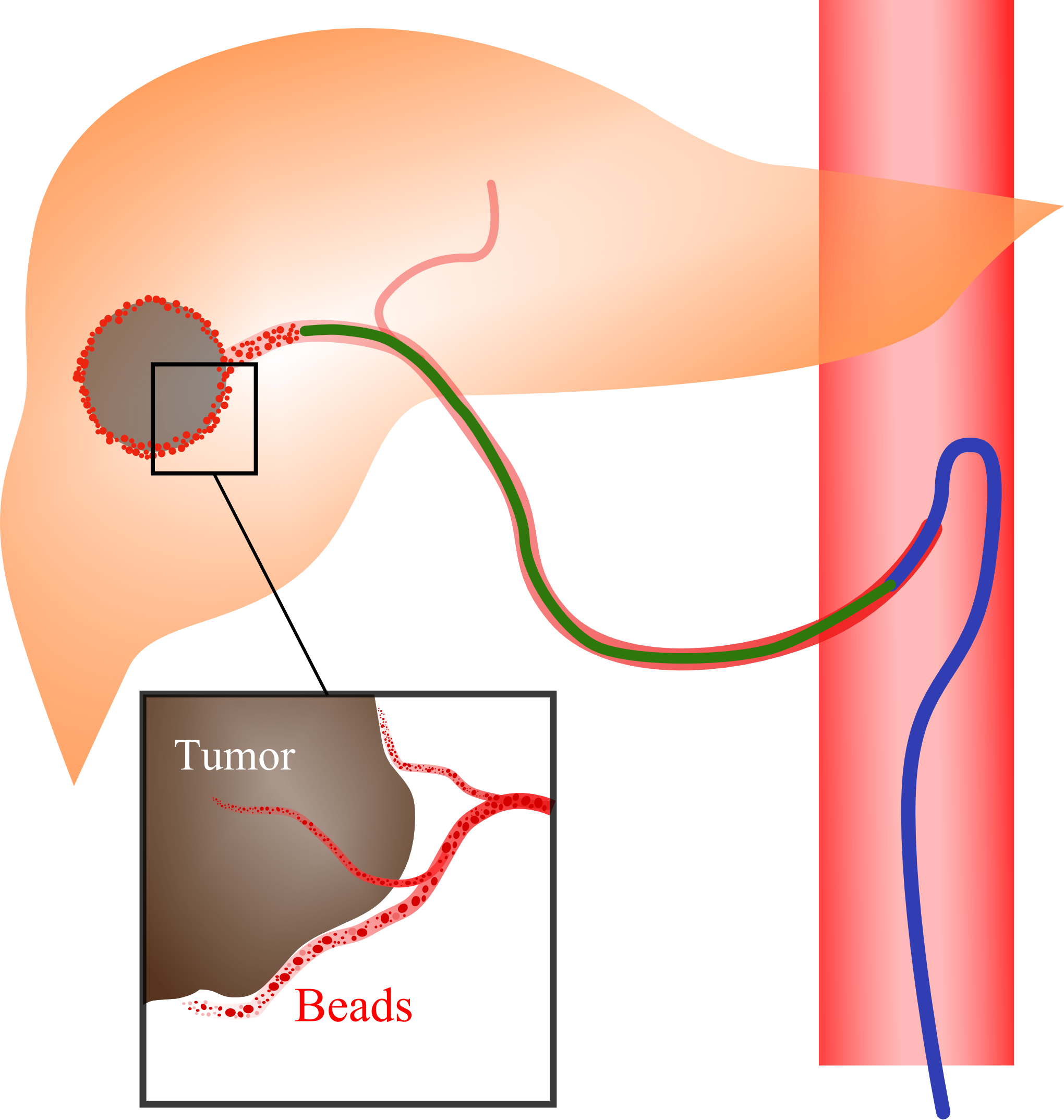 がんカテーテル治療のイメージしたもの